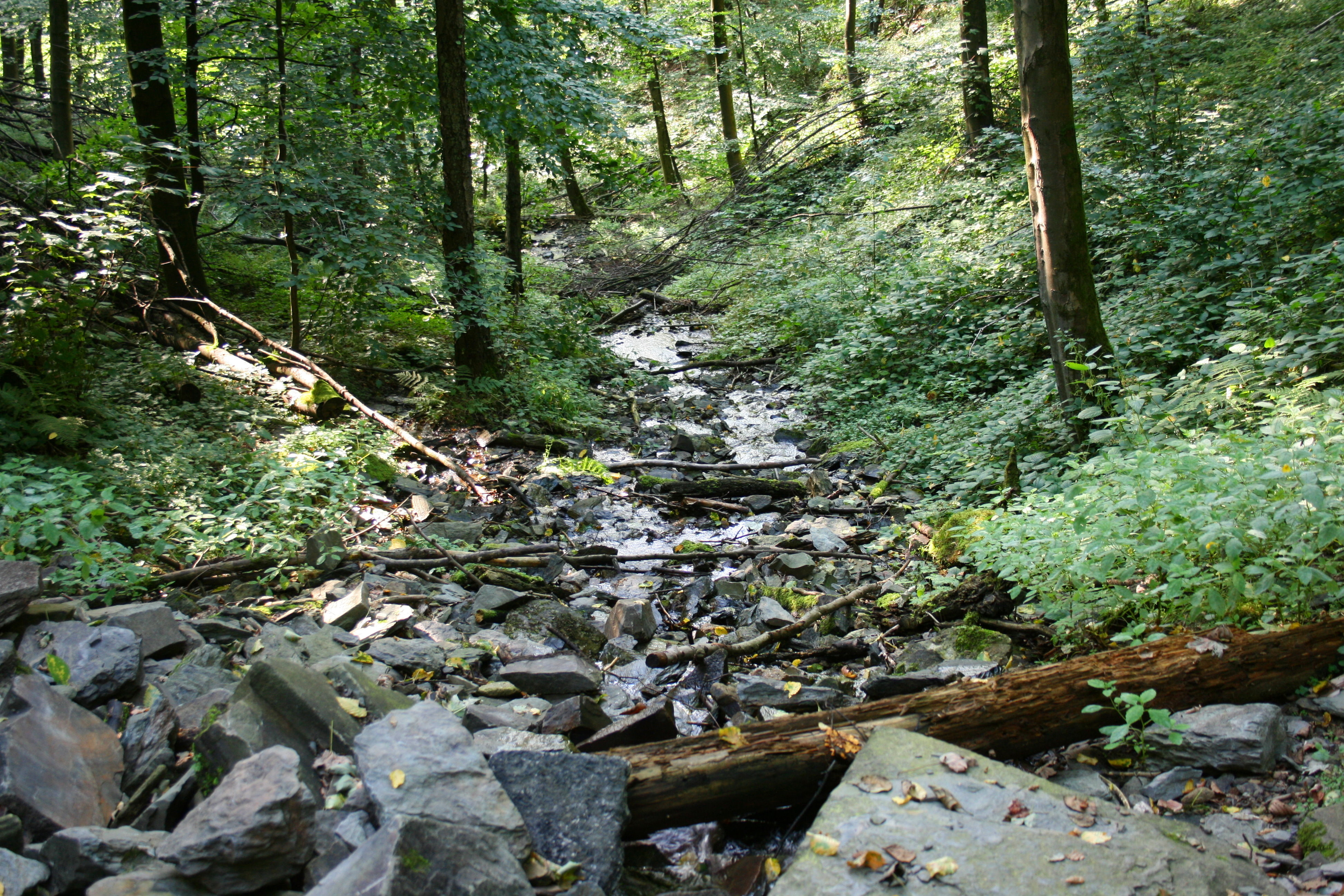 Reinshagener Bach in Remscheid